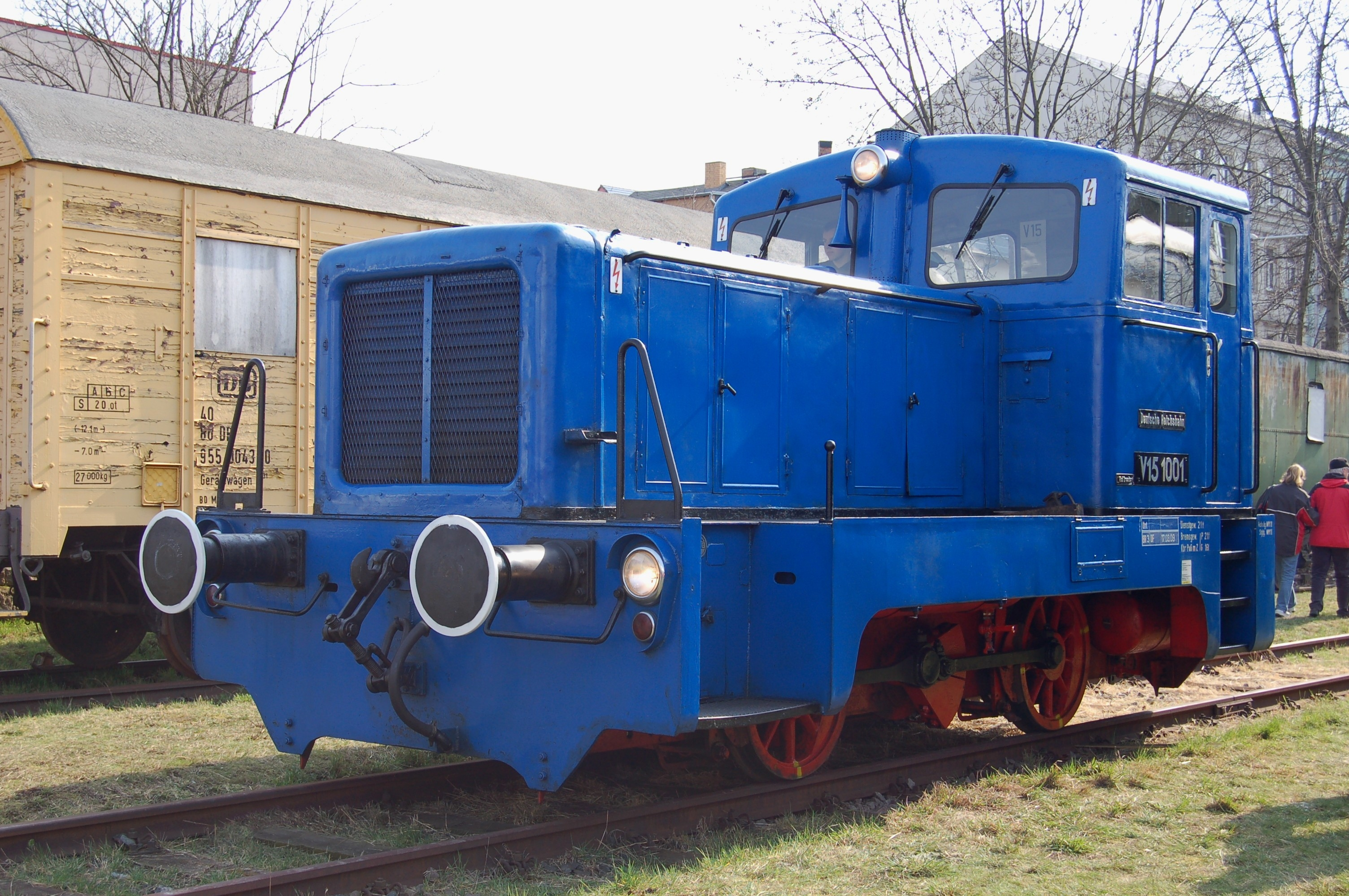 Diesellok V 15 1001 des Verkehrsmuseums Dresden im Bw Dresden-Altstadt